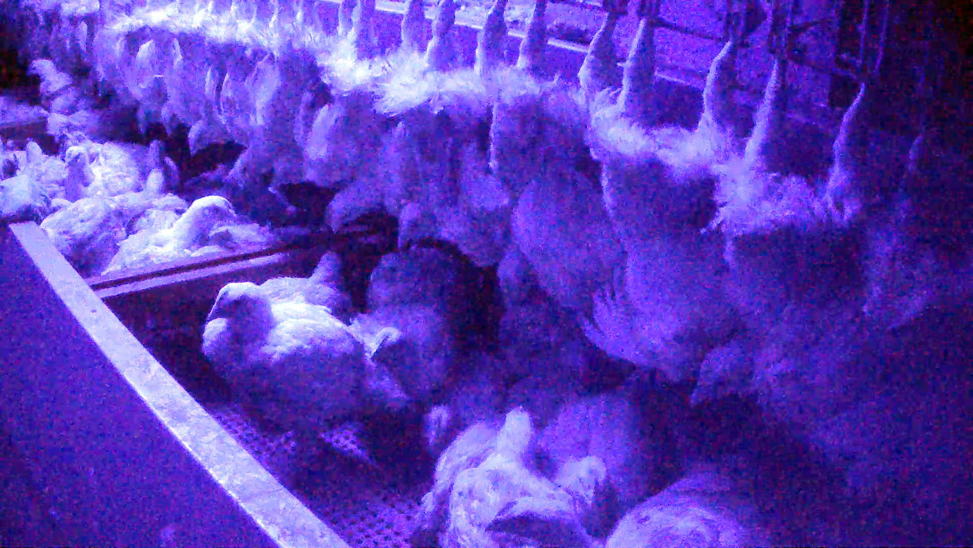 Abattoir de poulets (source L214)